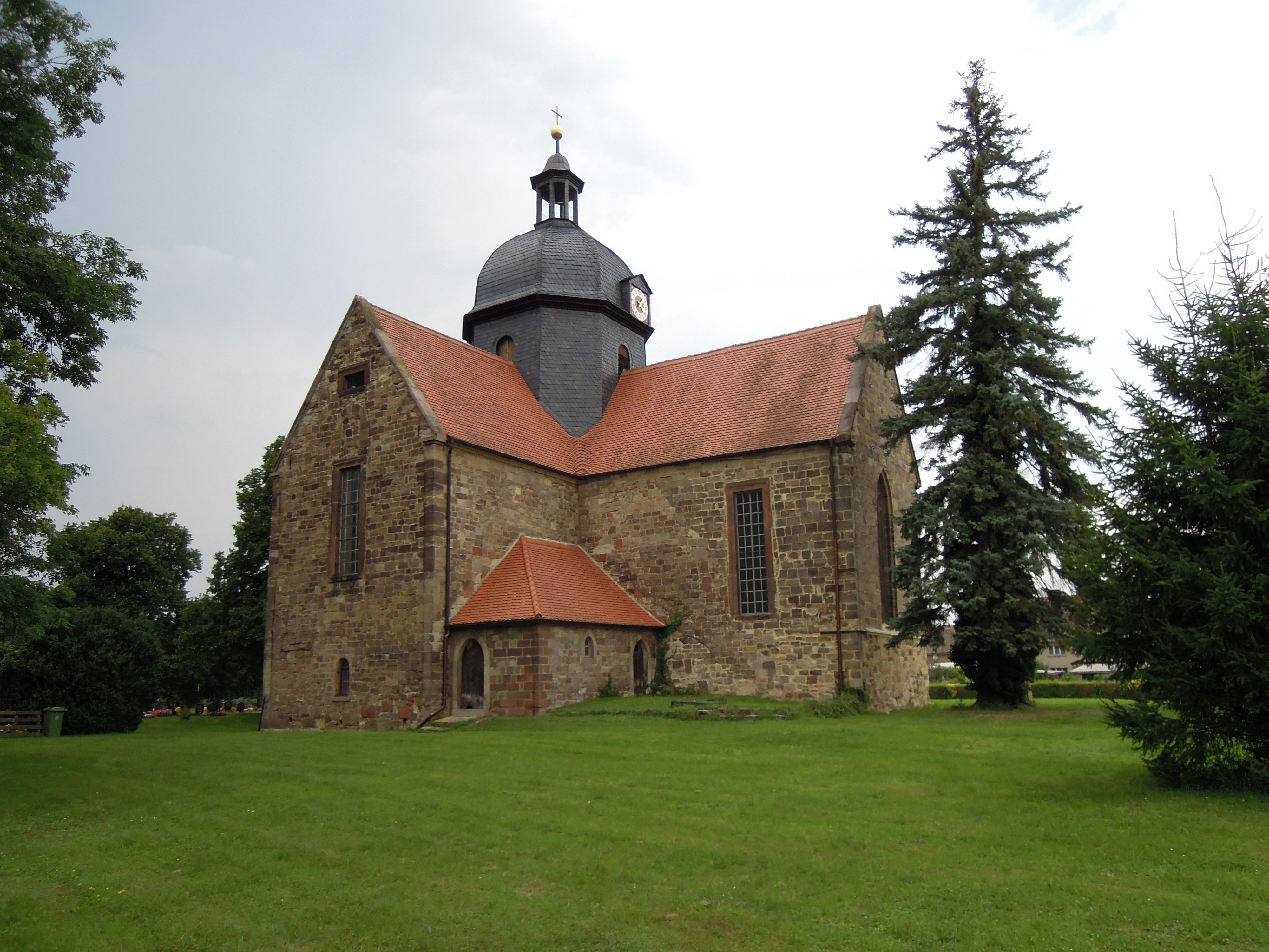 Kirche Reinsdorf Südseite